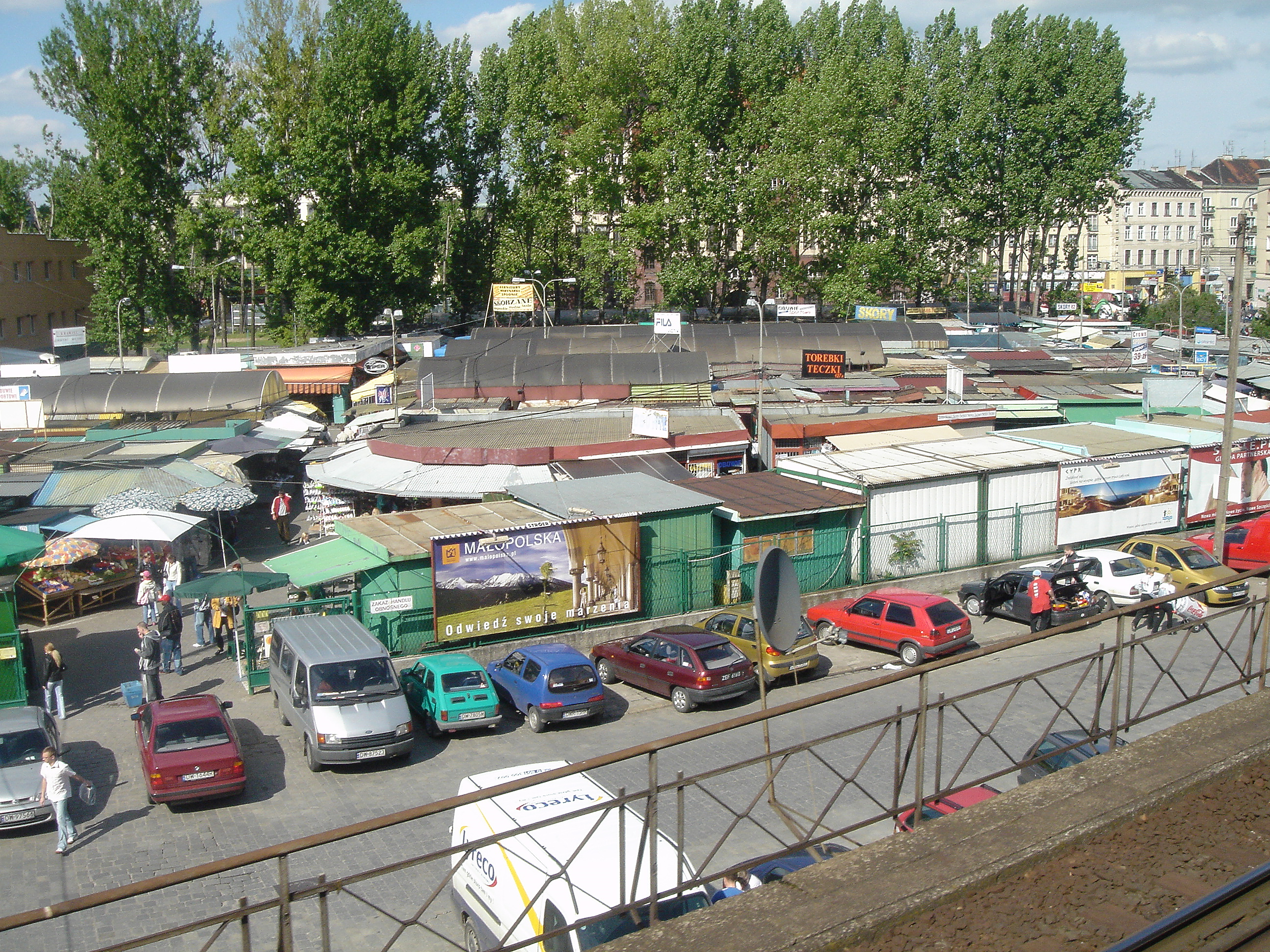 Plac targowy przy ul. Kolejowej i Zielińskiego, miejsce częściowo po dawnej Hali Targowej nr II. Targowisko też już nie istnieje.